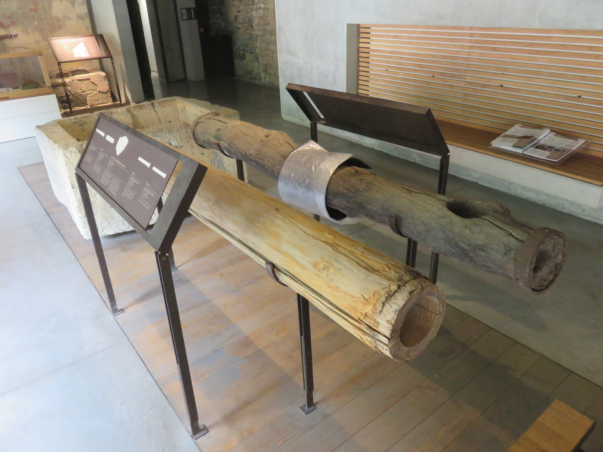 Saline de Salins-les-Bains, salle des vestiges du saumoduc de Salins-les-Bains à Arc-et-Senans